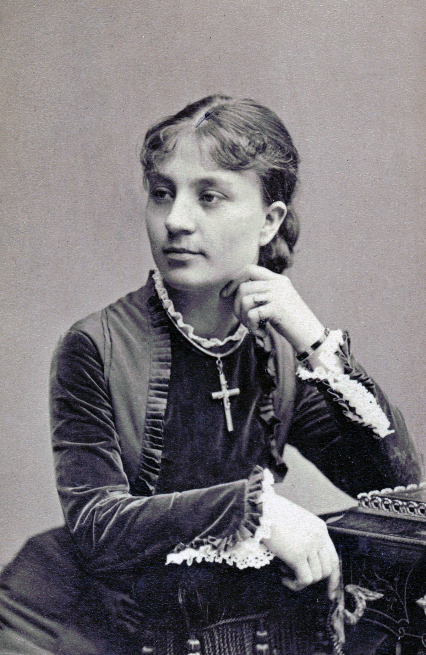 Dina Niehoff, sångare vid Kungliga Operan 1882